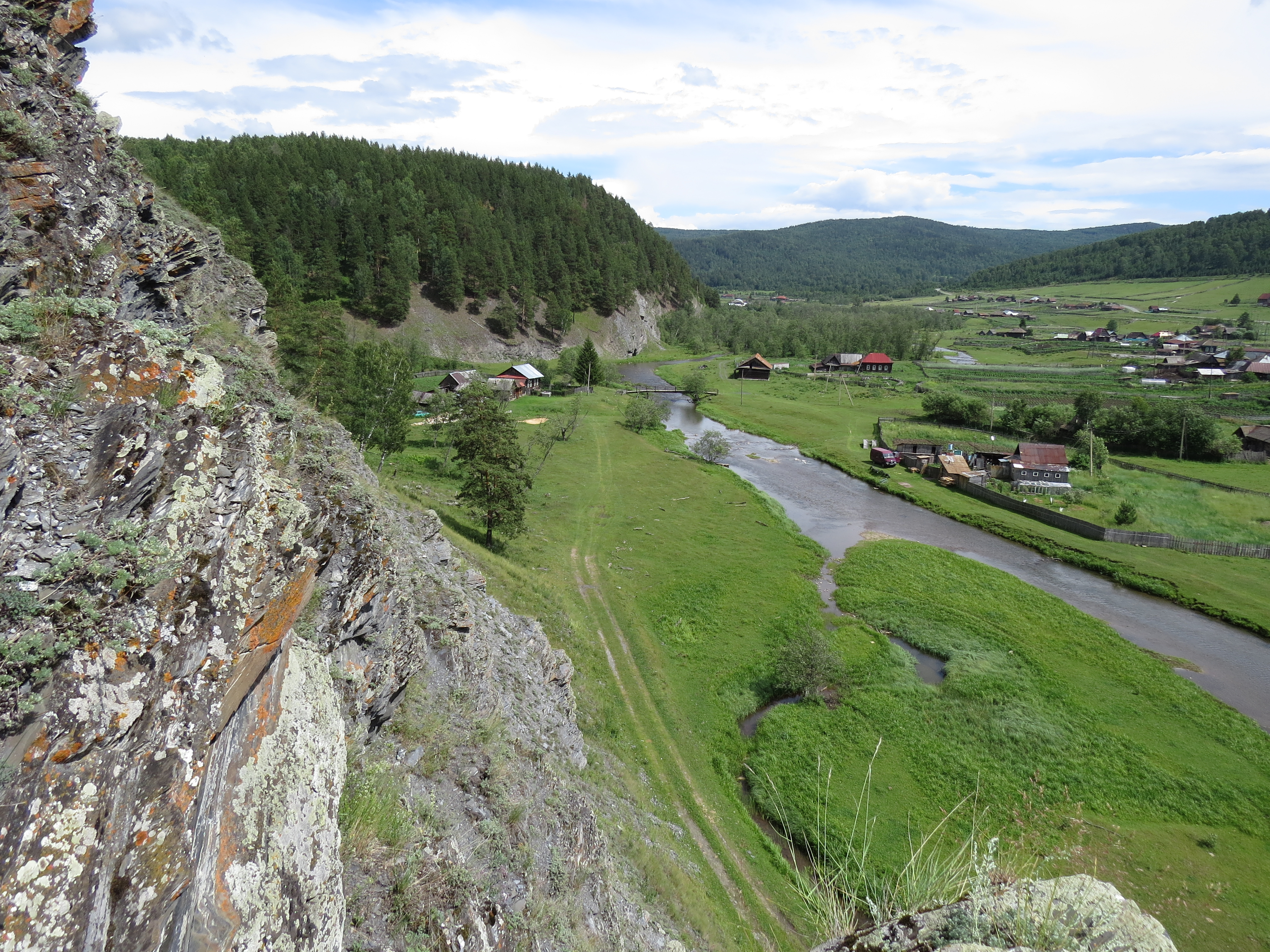 Ишля.